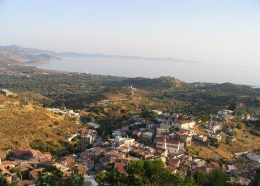 Village of Volissos in north-west Chios: View from the Castle/ Η Θέα από το Κάστρο